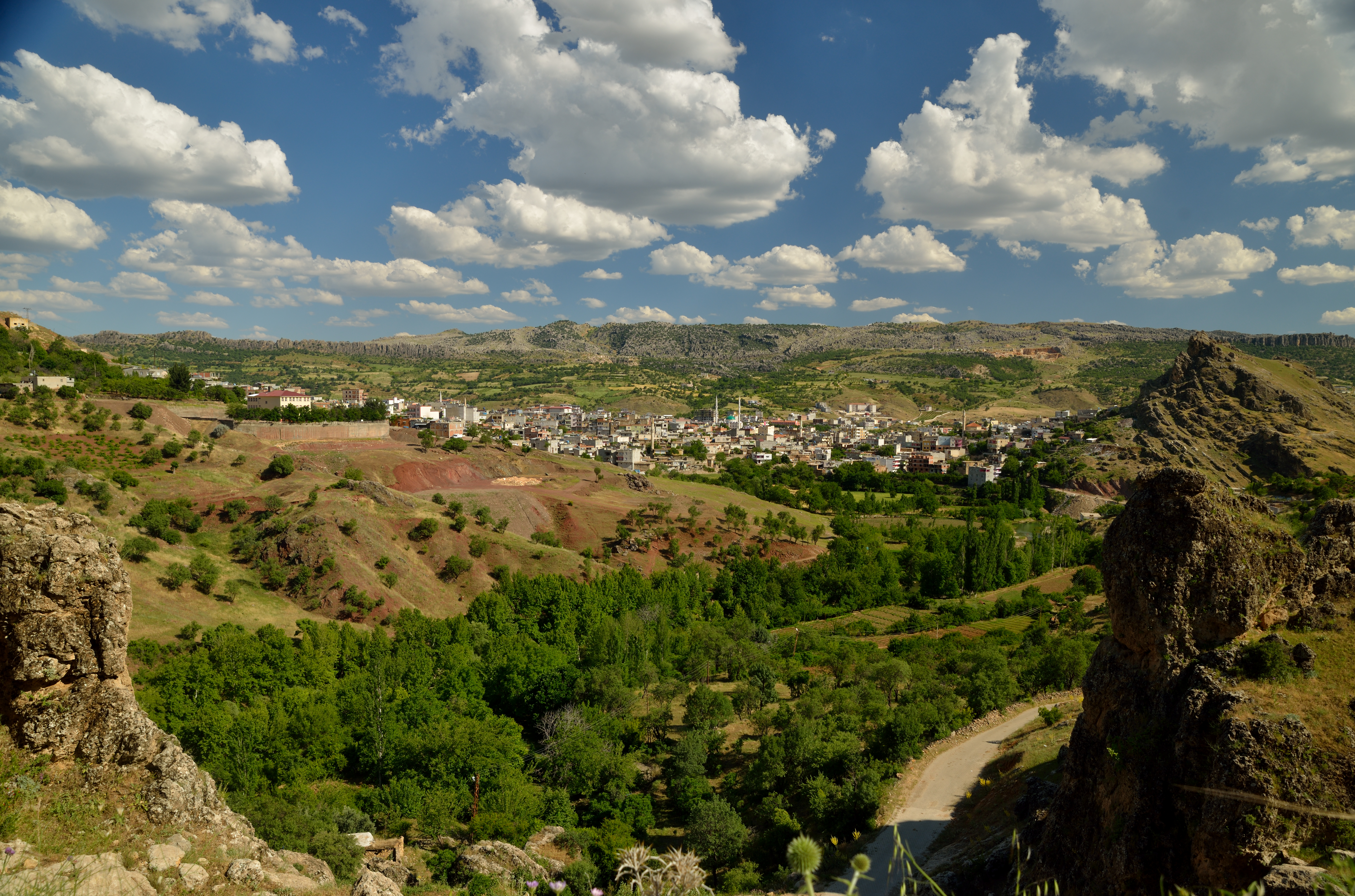 Kurdî: Navçeya Amedê